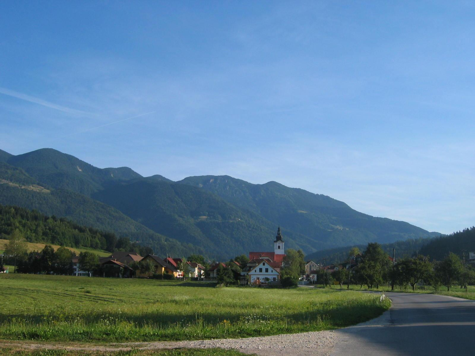 Rečica ob Savinji, village in Slovenija photo:Ziga 20:03, 18 August 2006 (UTC)